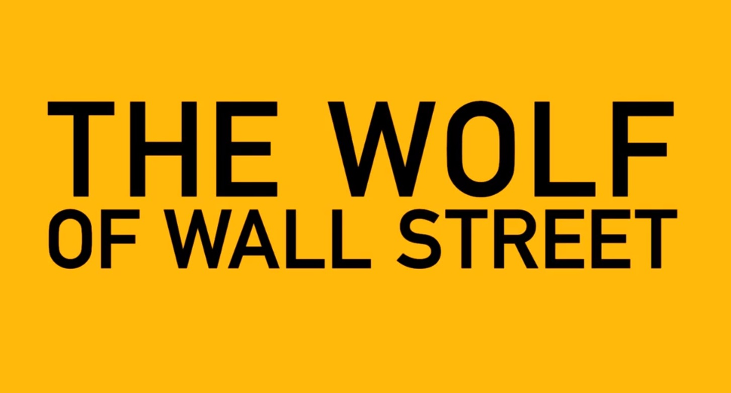 Logo du film Le Loup de Wall Street